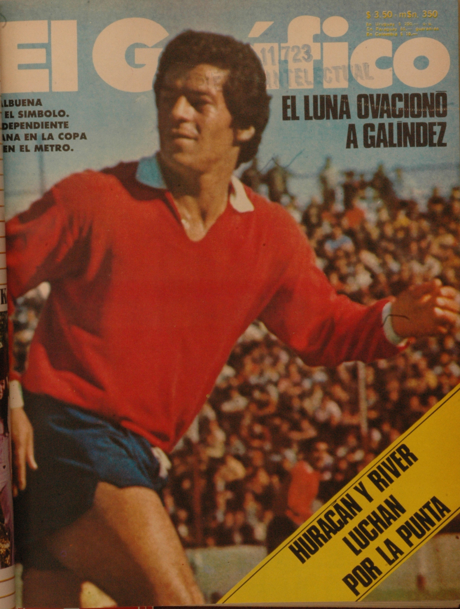 El Grafico del 15 de Mayo de 1973. Edicion 2797